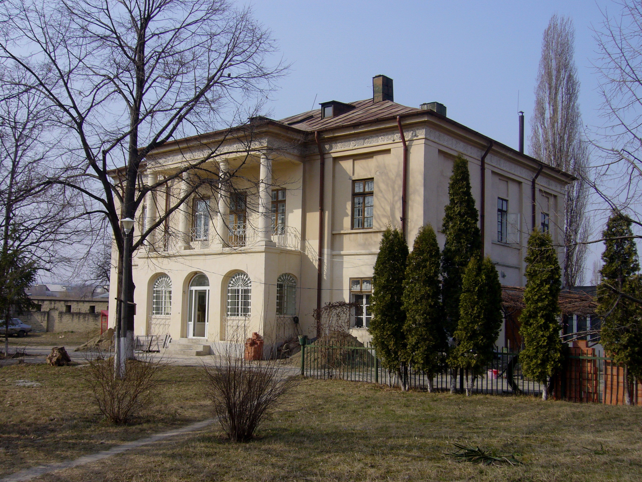 Mănăstirea Frumoasa